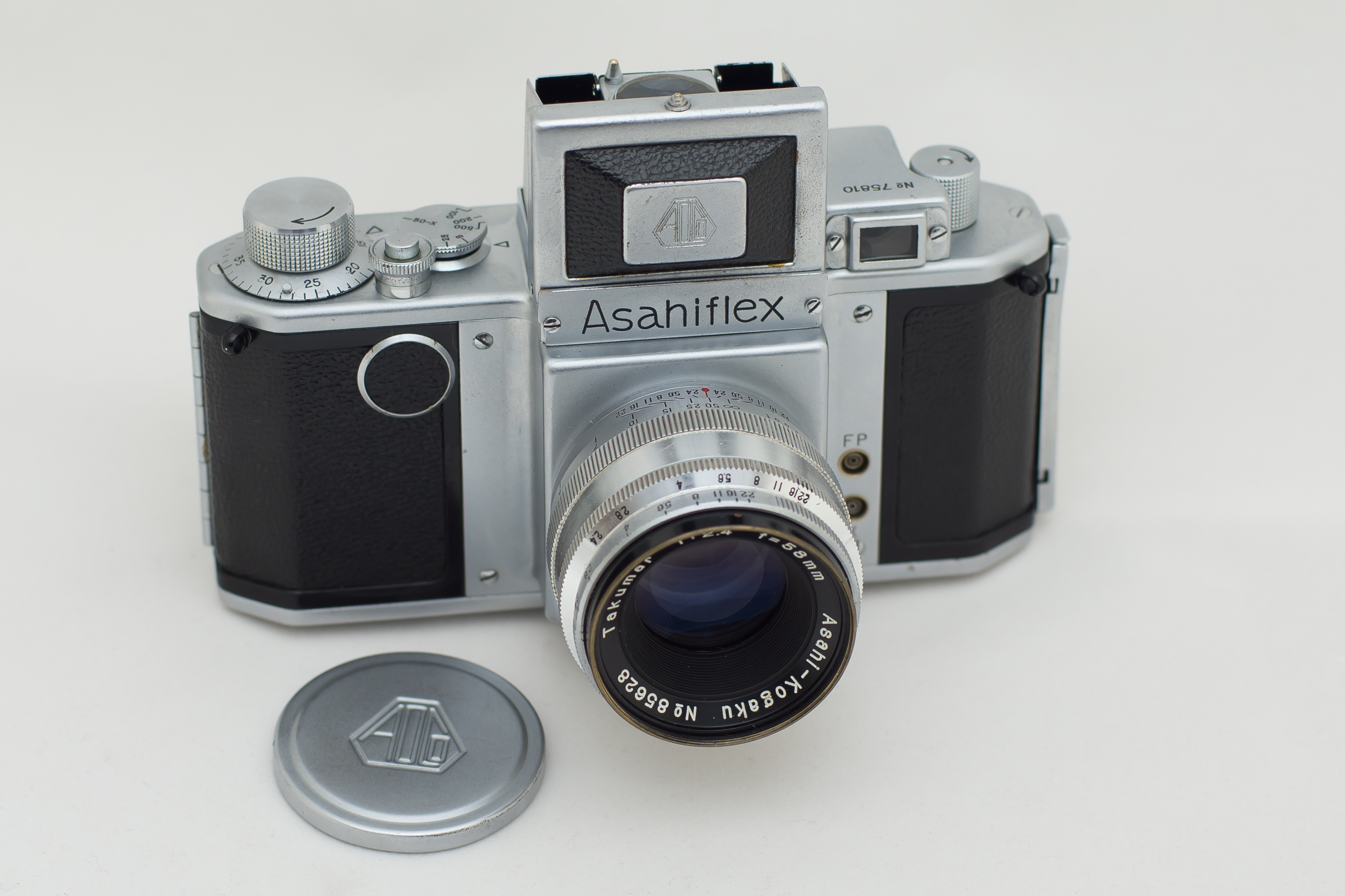 Переходная модель Asahiflex IIb. Корпус от Asahiflex IIa, на месте головки длинных выдержек стоит заглушка.